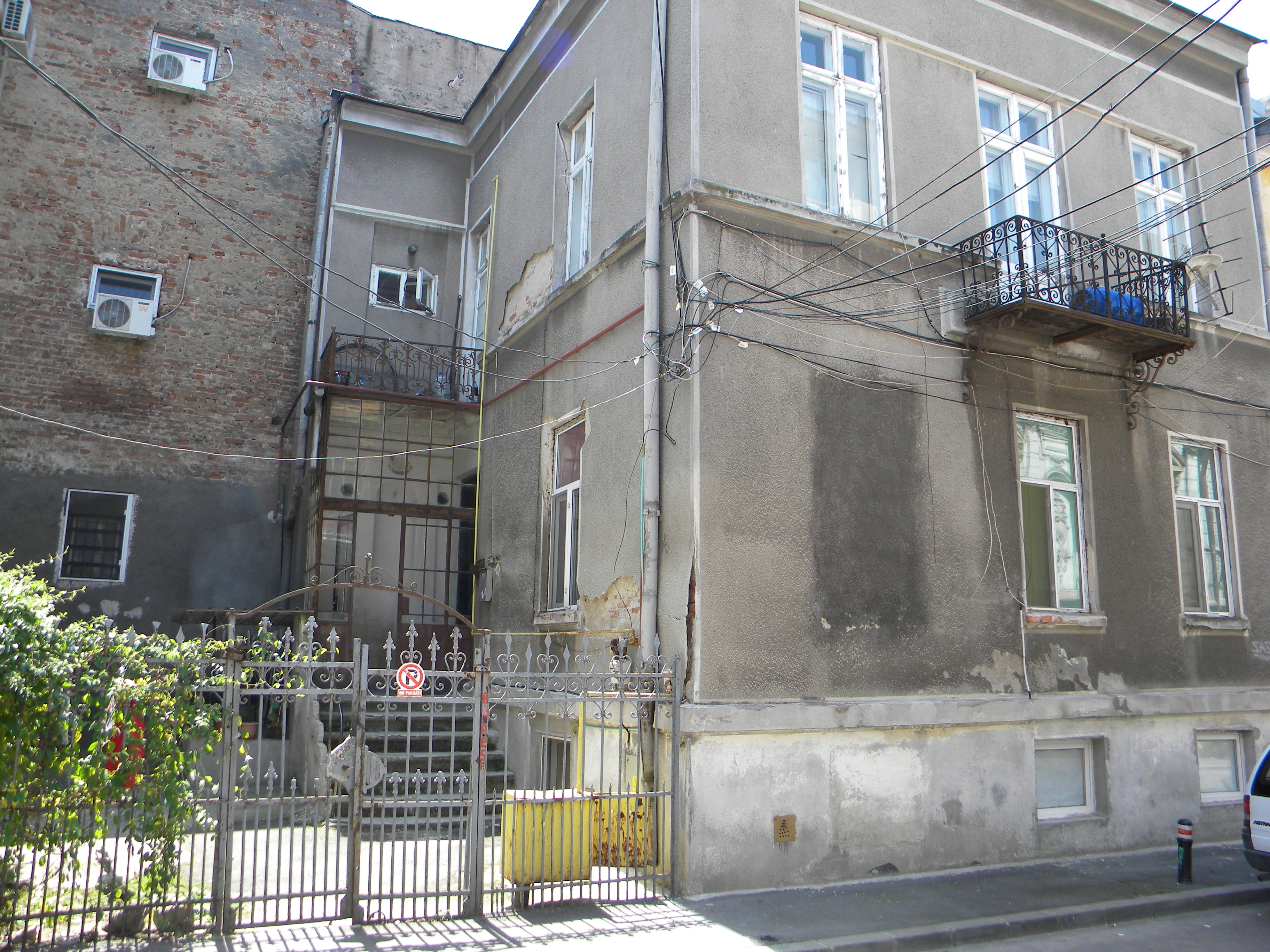 Bucuresti, Romania, Casa pe Str. Patrascu Voda nr. 12; B-II-m-B-19373